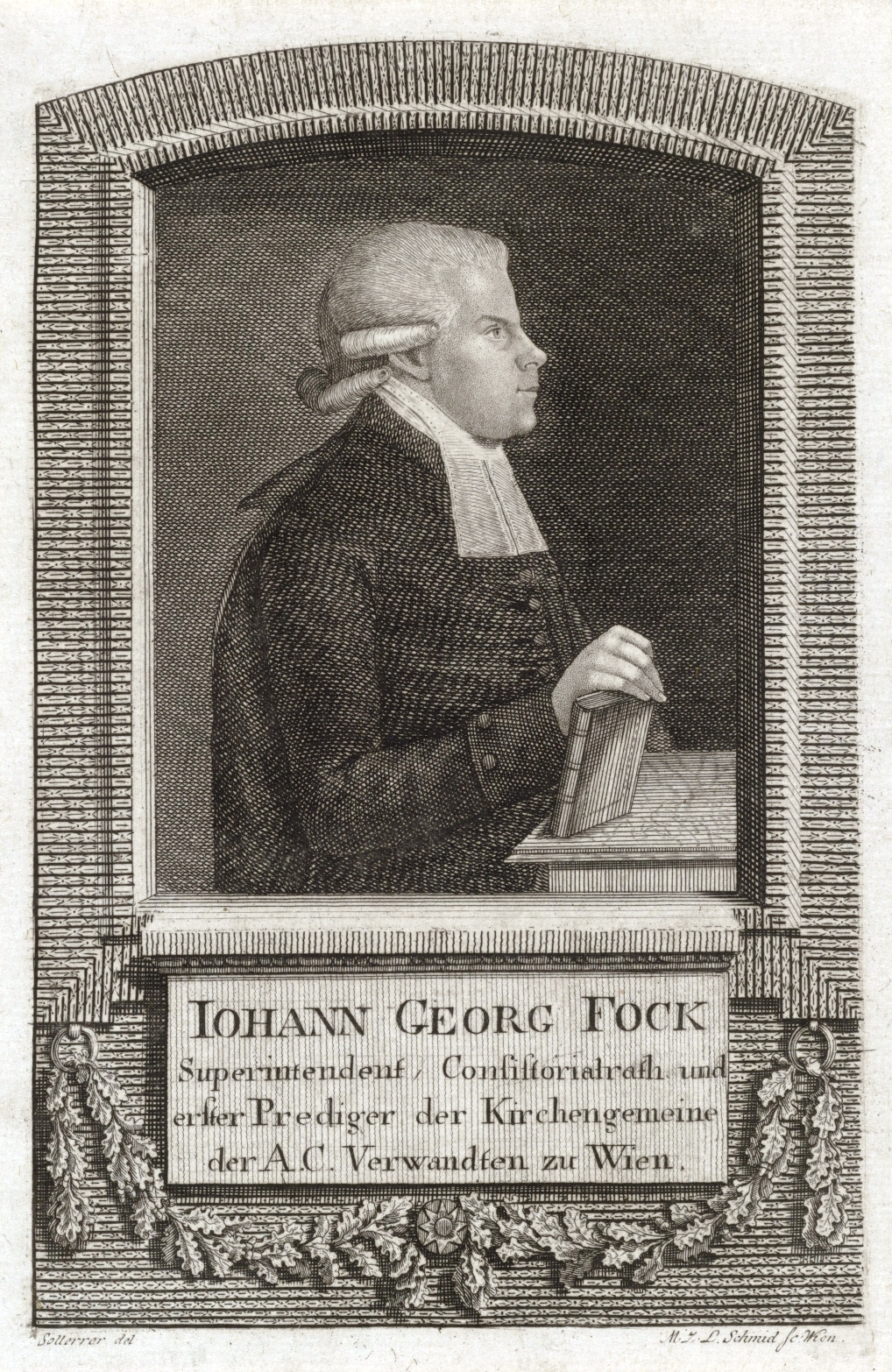 Johann Georg Fock (1757–1835)